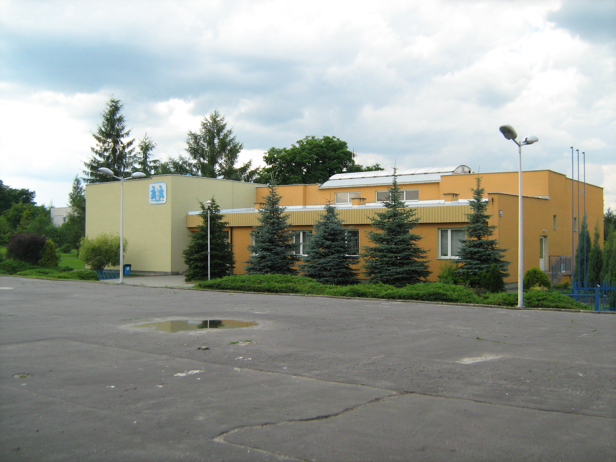 Budynki Wioski Dziecięcej SOS w Biłgoraju.